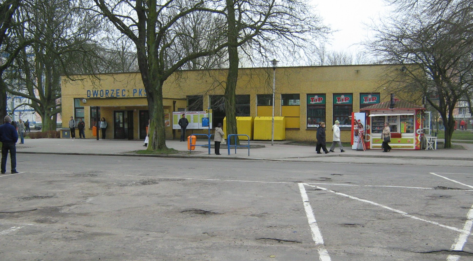 Budynek dworca autobusowego w Kołobrzegu, widok od strony północnej.